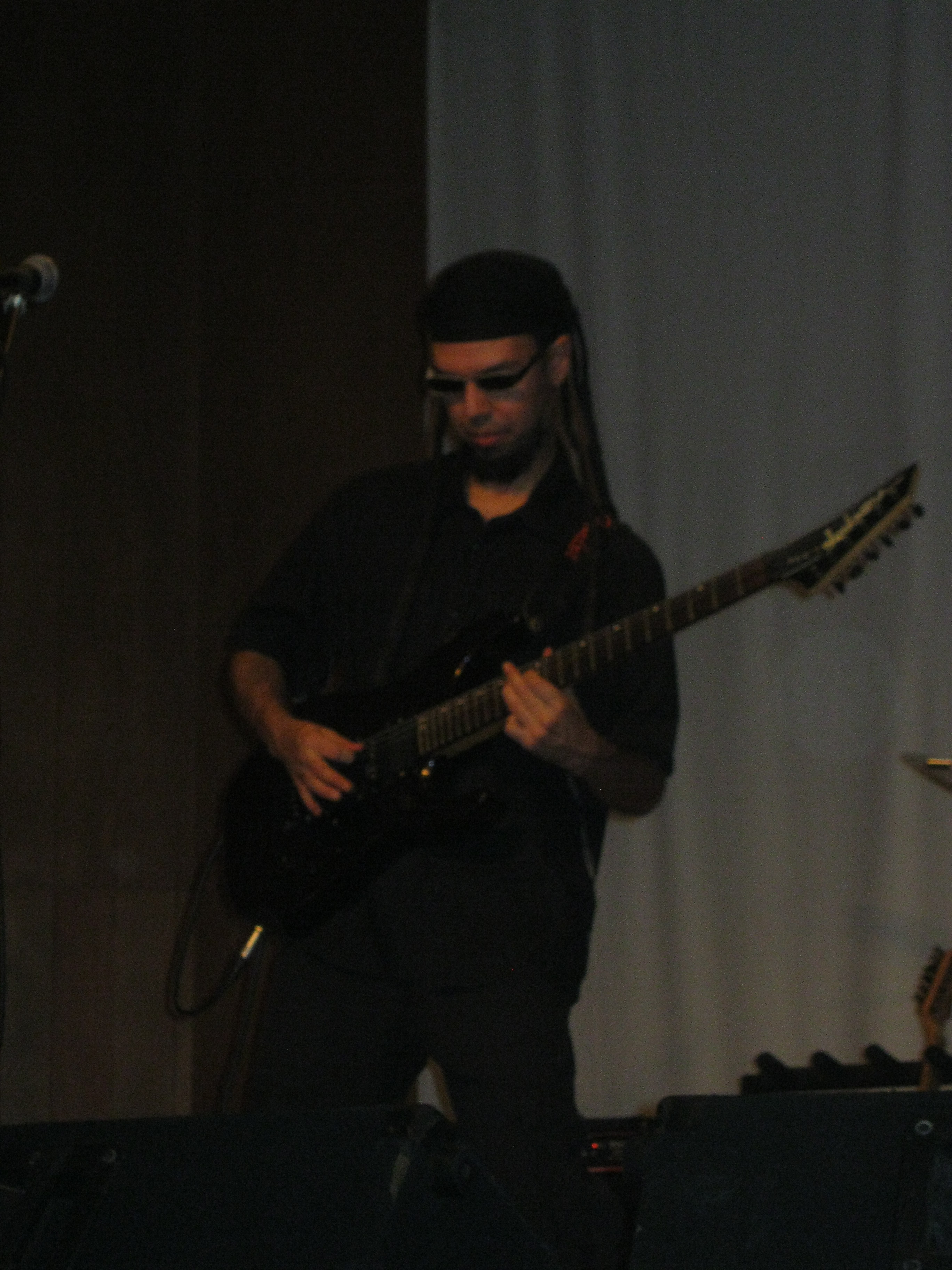 Concierto en conmemoración de los 15 años de la banda caleña de metal progresivo Legend Maker